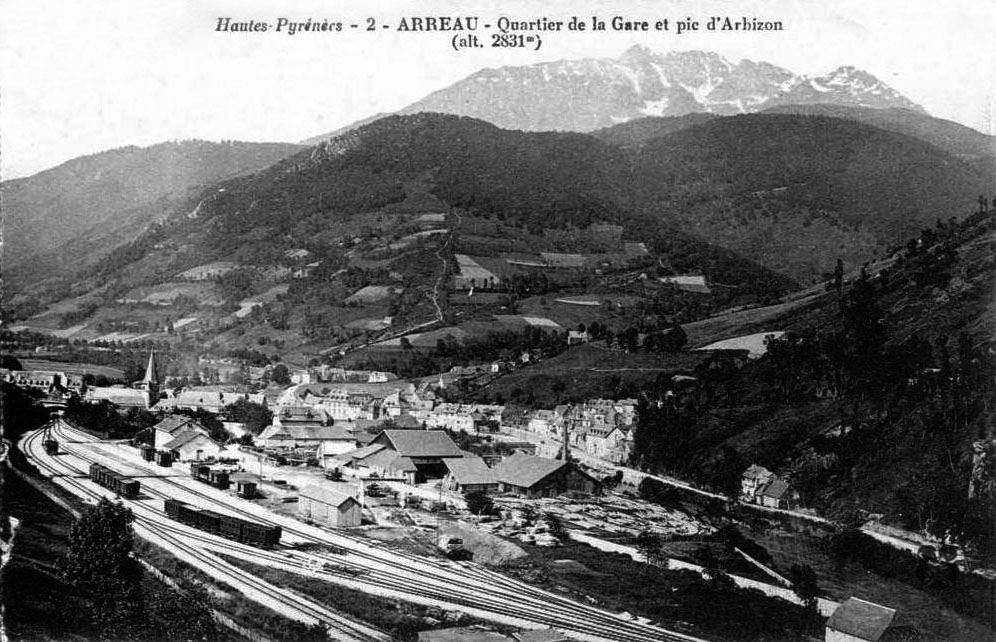 Carte postale des années 1900 montrant la gare d'Arreau dans son ensemble et son quartier. L'électrification de la ligne n'est pas encore réalisée.